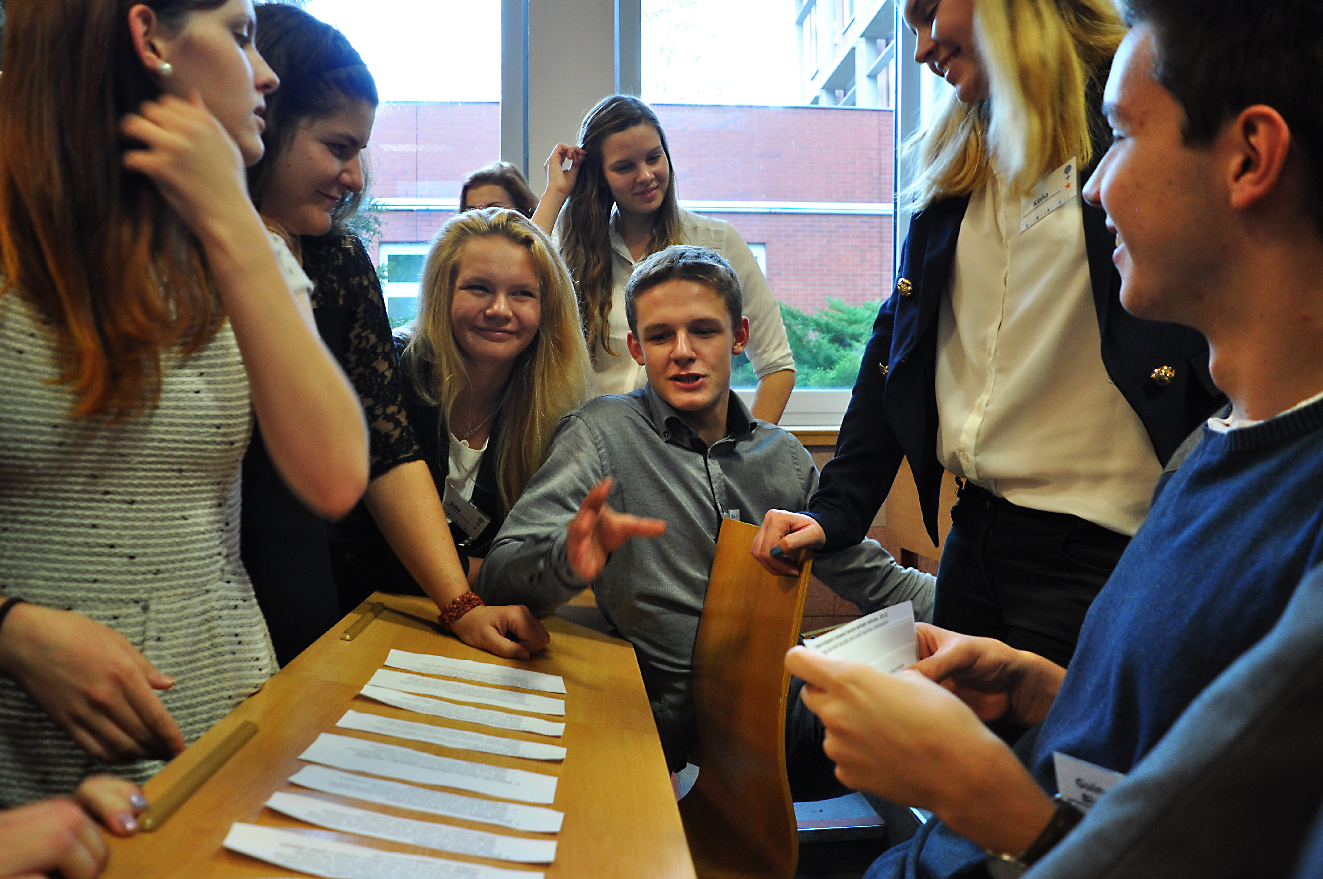 kuloarko